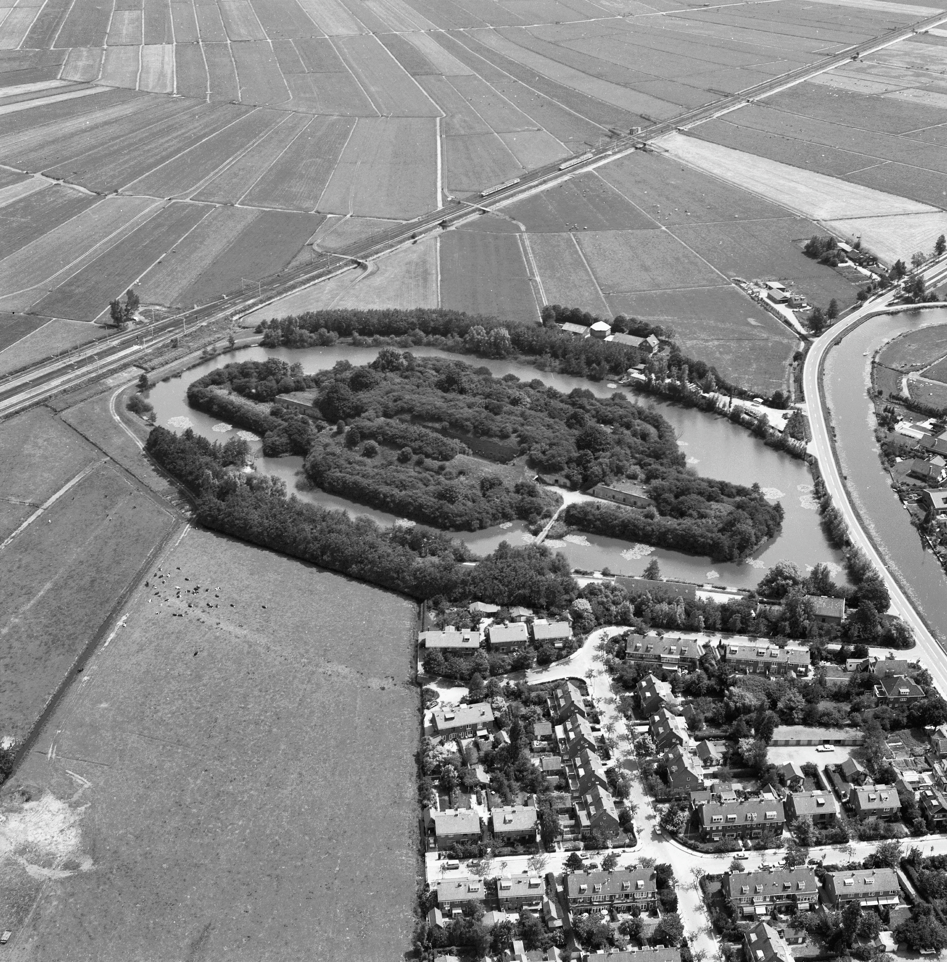 Overzichten + Pl. Gronden: luchtfoto